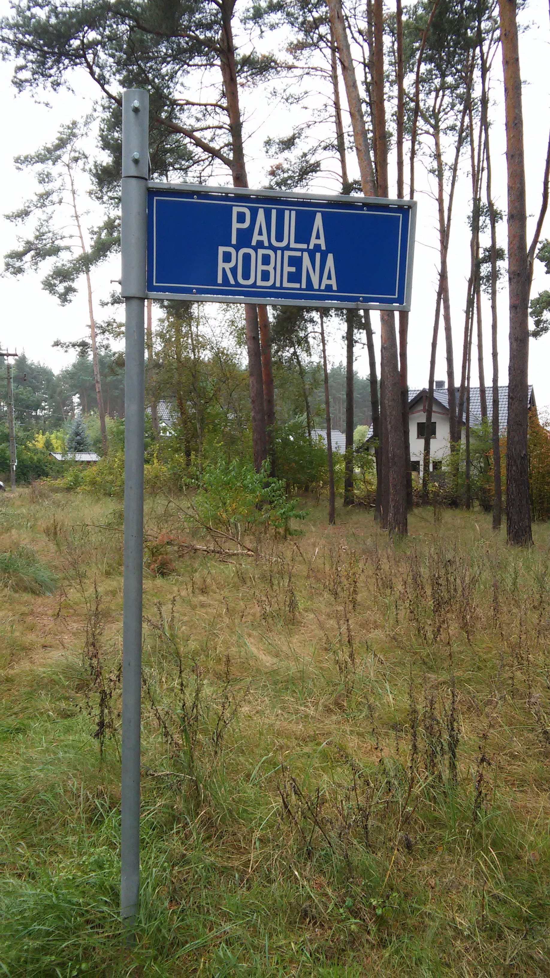 Ul. Robiena, Szczecin